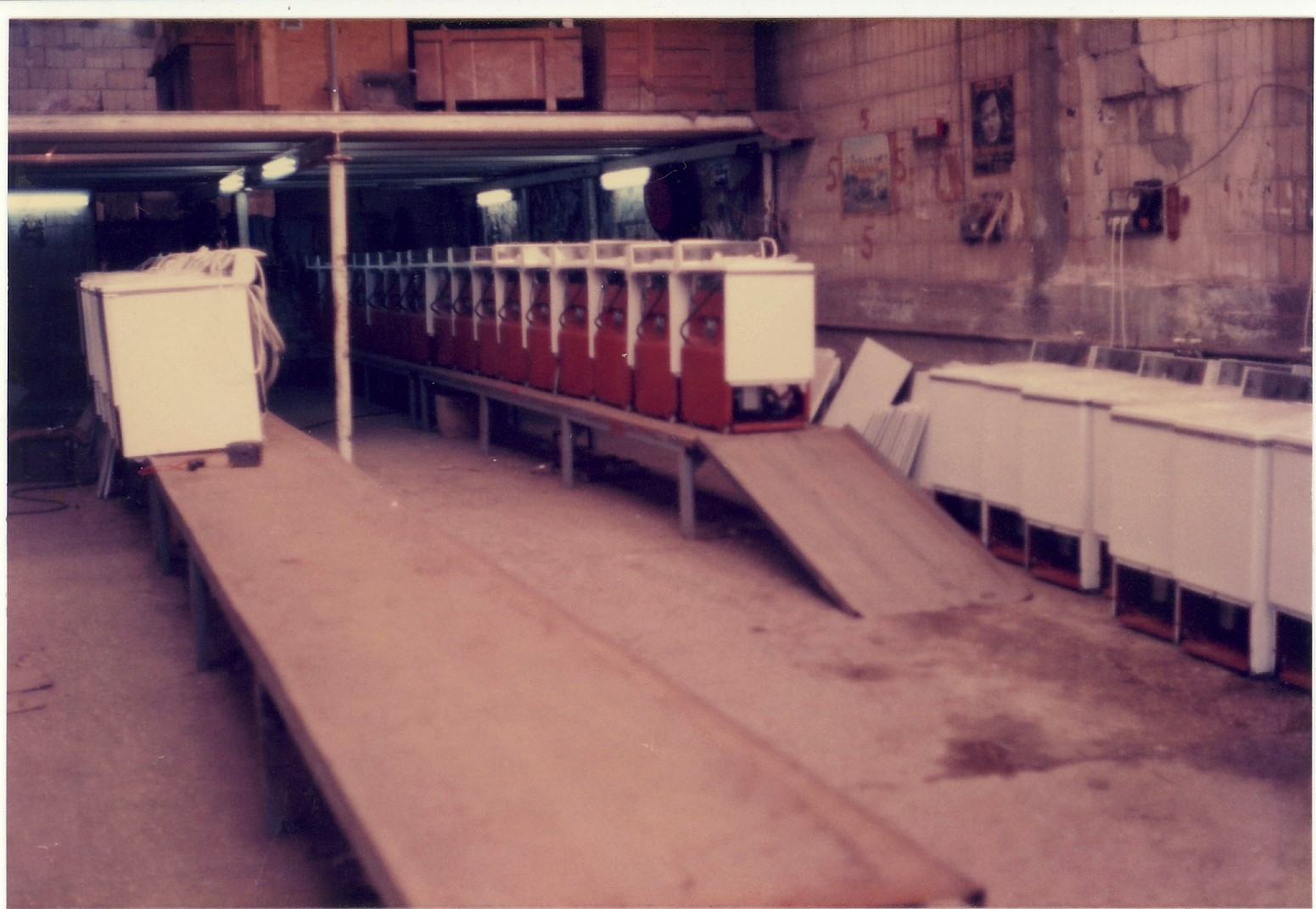 פס ייצור של הרכבת מכונות כביסה. על הפס היו תחנות רבות שבסופן הורכבה מכונה שלמה.